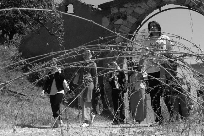 Косово и Метохија: Верници излазе из порушеног српског православног манастира Девич, којег су француски војници због честих напада албанских терориста оградили бодљикавом жицом.Фотографије из пројекта "Корени душе". Фото:Дарко Дозет